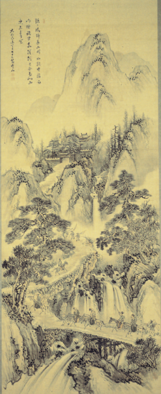 山水画 蜀桟道図